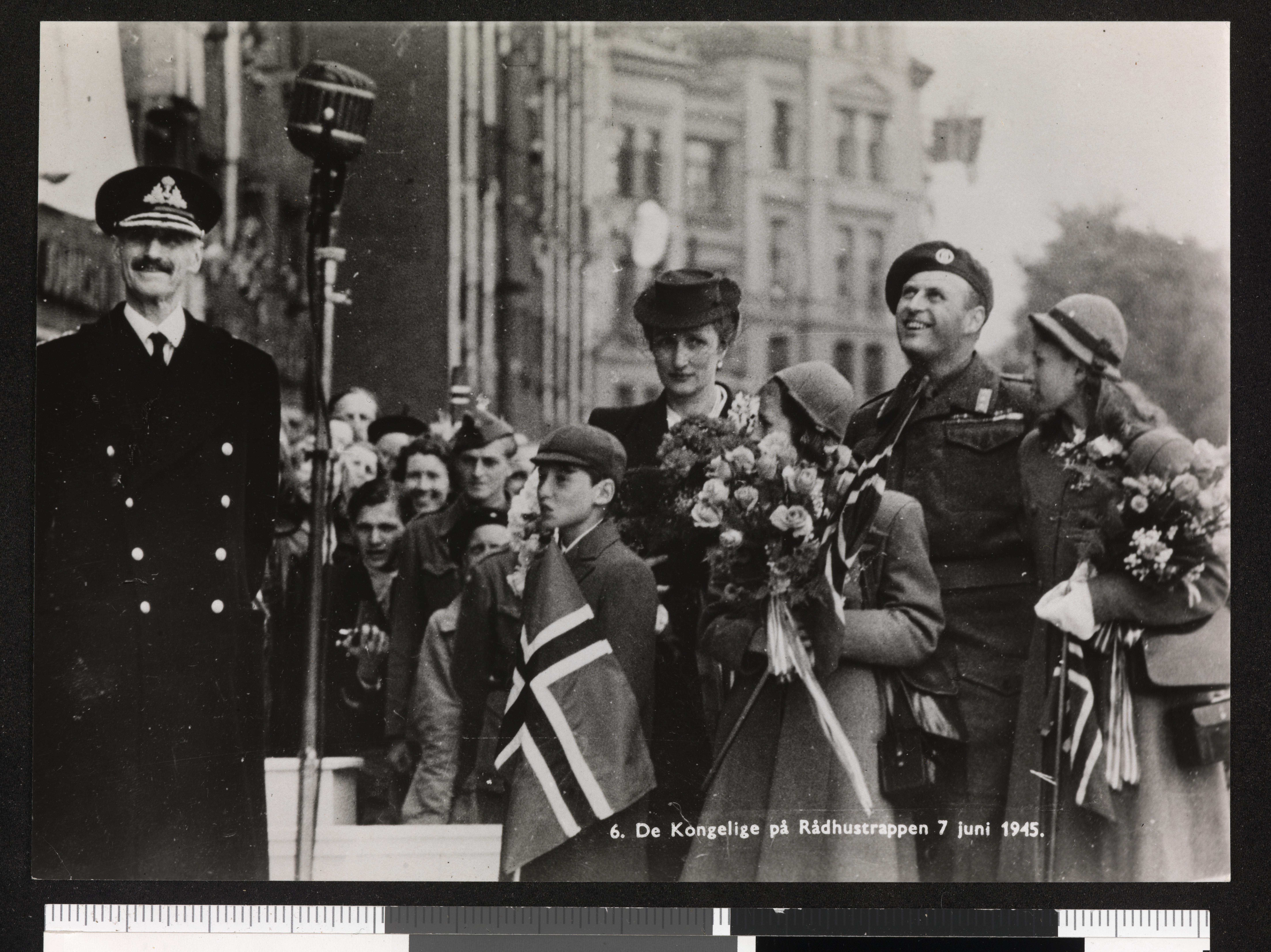 Bildet er hentet fra Nasjonalbibliotekets bildesamling Depicted person: Olav V konge av Norge Depicted person: Harald V konge av Norge Depicted person: Ragnhild, fru Lorentzen Prinsesse av Norge Depicted person: Haakon VII konge av Norge Depicted person: Märtha kronprinsesse av Norge Depicted person: Astrid prinsesse, datter av Olav 5, konge av Norge